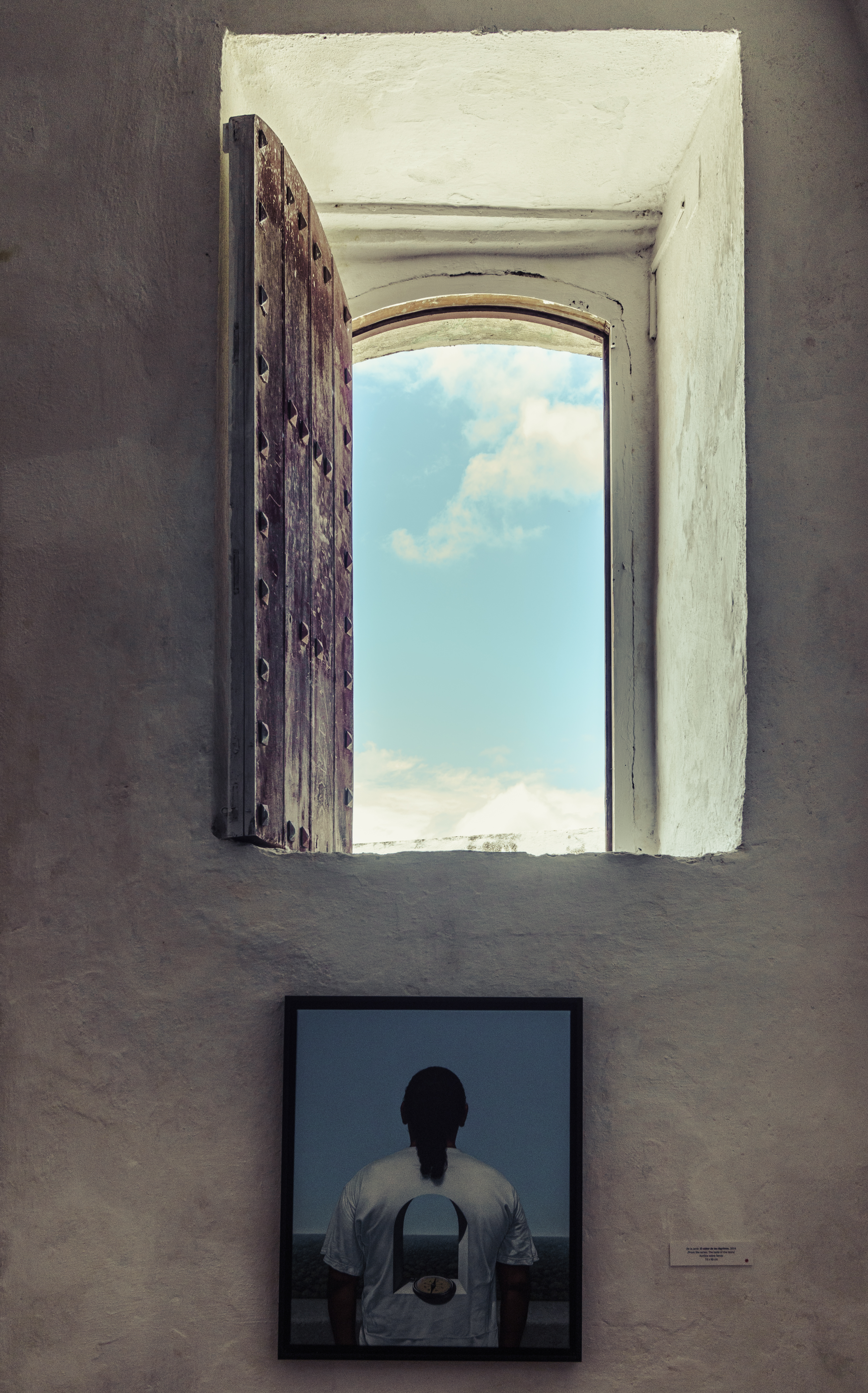 Bienal de Artes - Habana